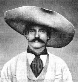 Foto restaurada del general zapatista Jose Rodriguez.